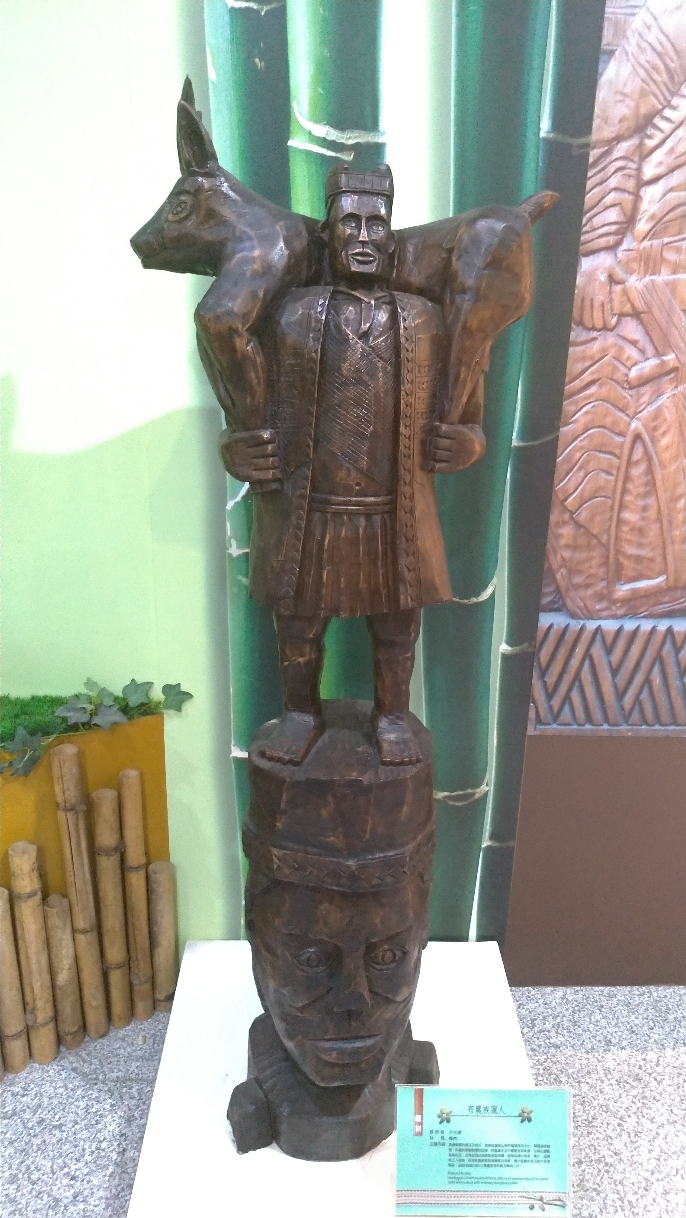 中文（台灣）: 台灣原住民屋，布農族獵人